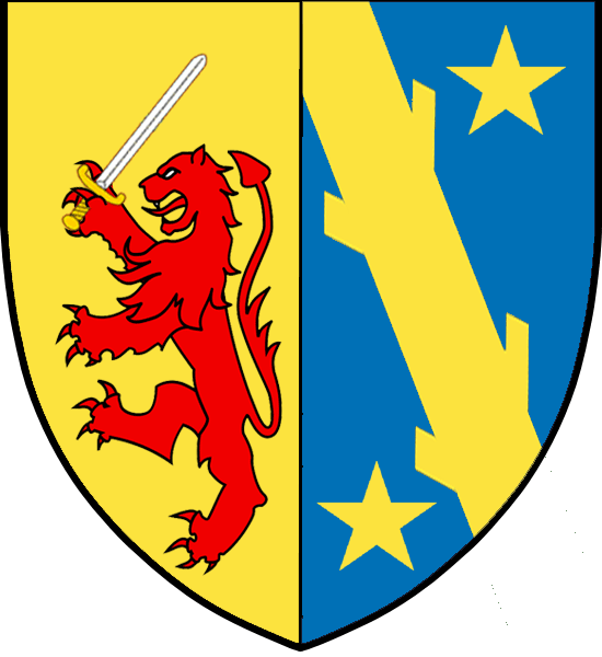 Vapensköld för adelsätten